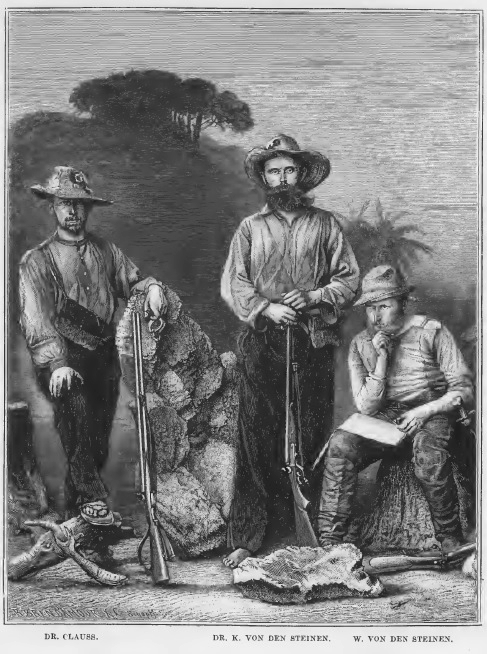 Gruppenbild "Dr. Karl von den Steinen und seine Reisegefährten", mit Dr. Otto Clauss (links), Dr. Karl von den Steinen (mitte) und Wilhelm von den Steinen (rechts); Holzstich von Richard Brend’amour; Titelbild des Buches "Durch Central-Brasilien - Expedition zur Erforschung des Schingú im Jahre 1884" - F. A. BROCKHAUS 1886